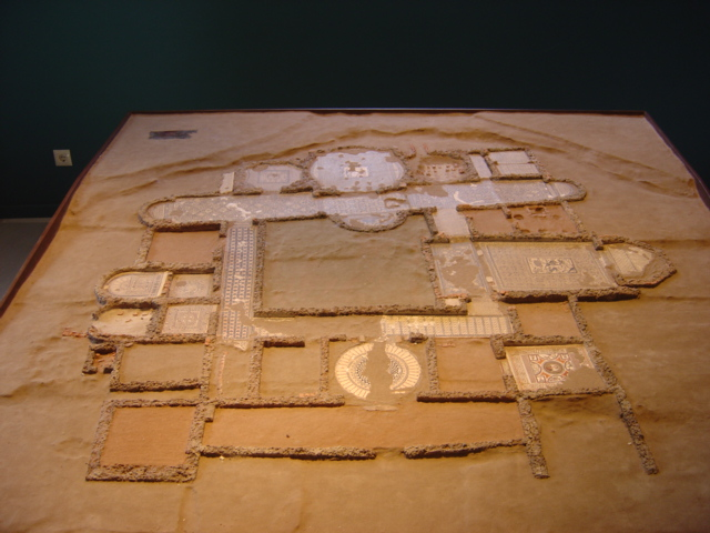 Reconstrucción de la Villa Romana de Carranque (Carranque, Toledo)